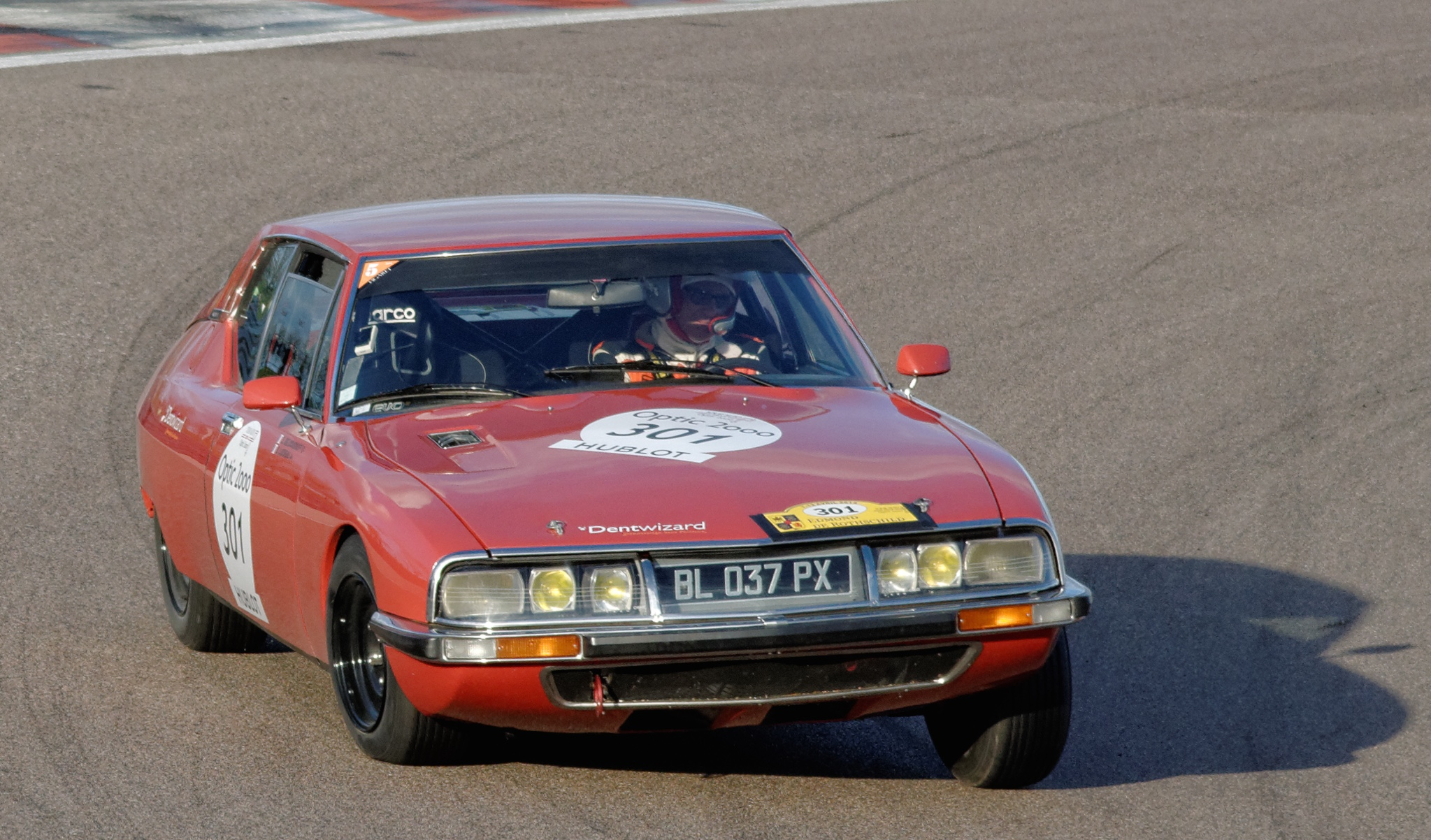 Citroen SM, Tour Auto 2014, étape sur le Circuit de Prenois.